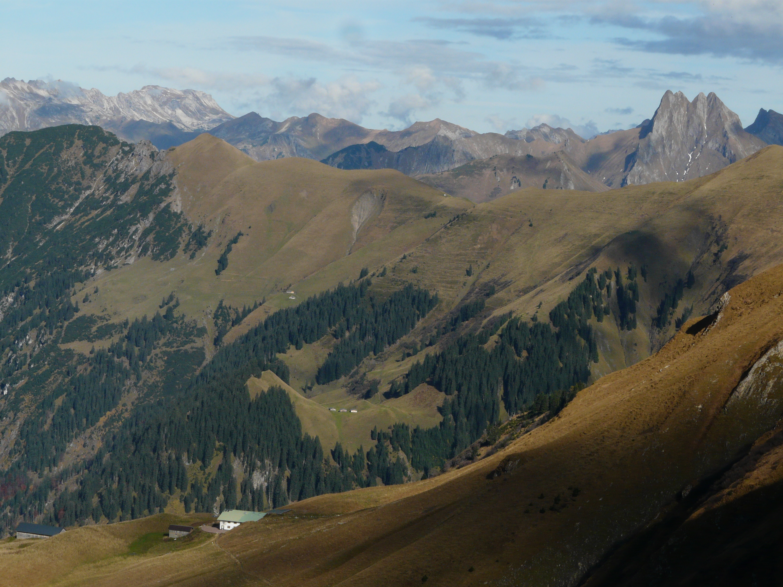 Blick über die Enzianhütte zum Schmalhorn (links) und Höfats (rechts)